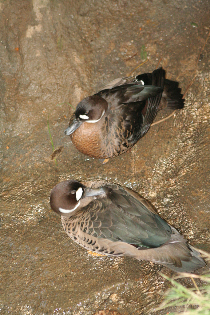 Spectacled Duck (Speculanas specularis)